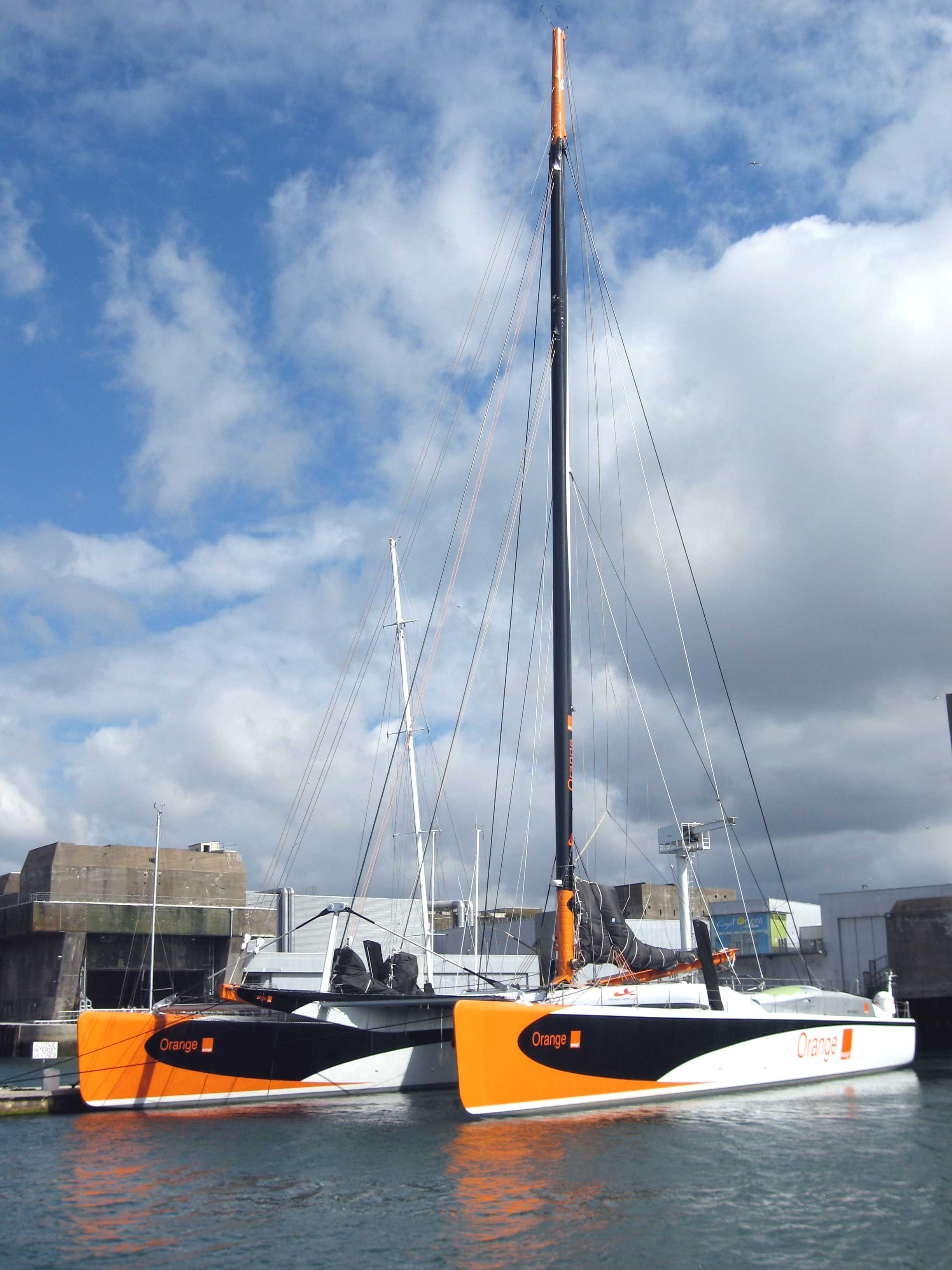 Description : Maxi Catamaran Orange de Bruno Peyron Lieu : Lorient, Bretagne, France Date : Aout 2006 Auteur : Pline Longueur : 36,80 m Largeur (espace entre les coques): 18 m Hauteur du mât: 45 m Tirants d'eau: 5,50 m (dérive basse) Surface de voile: 800 m2 au près, 1100 m2 au portant